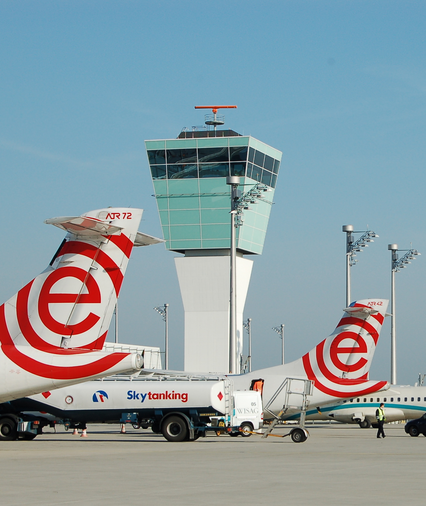 Vorfeldtower Ost Flughafen München